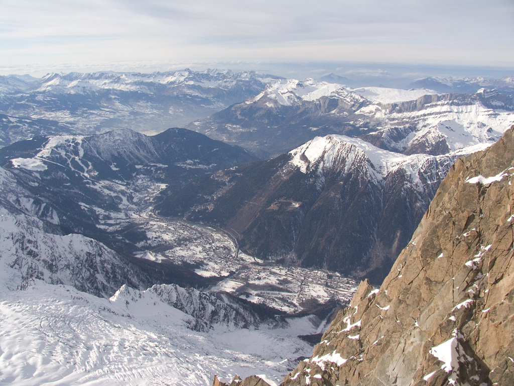 Golygfa ar Chamonix o'r Aiguille du Midi.